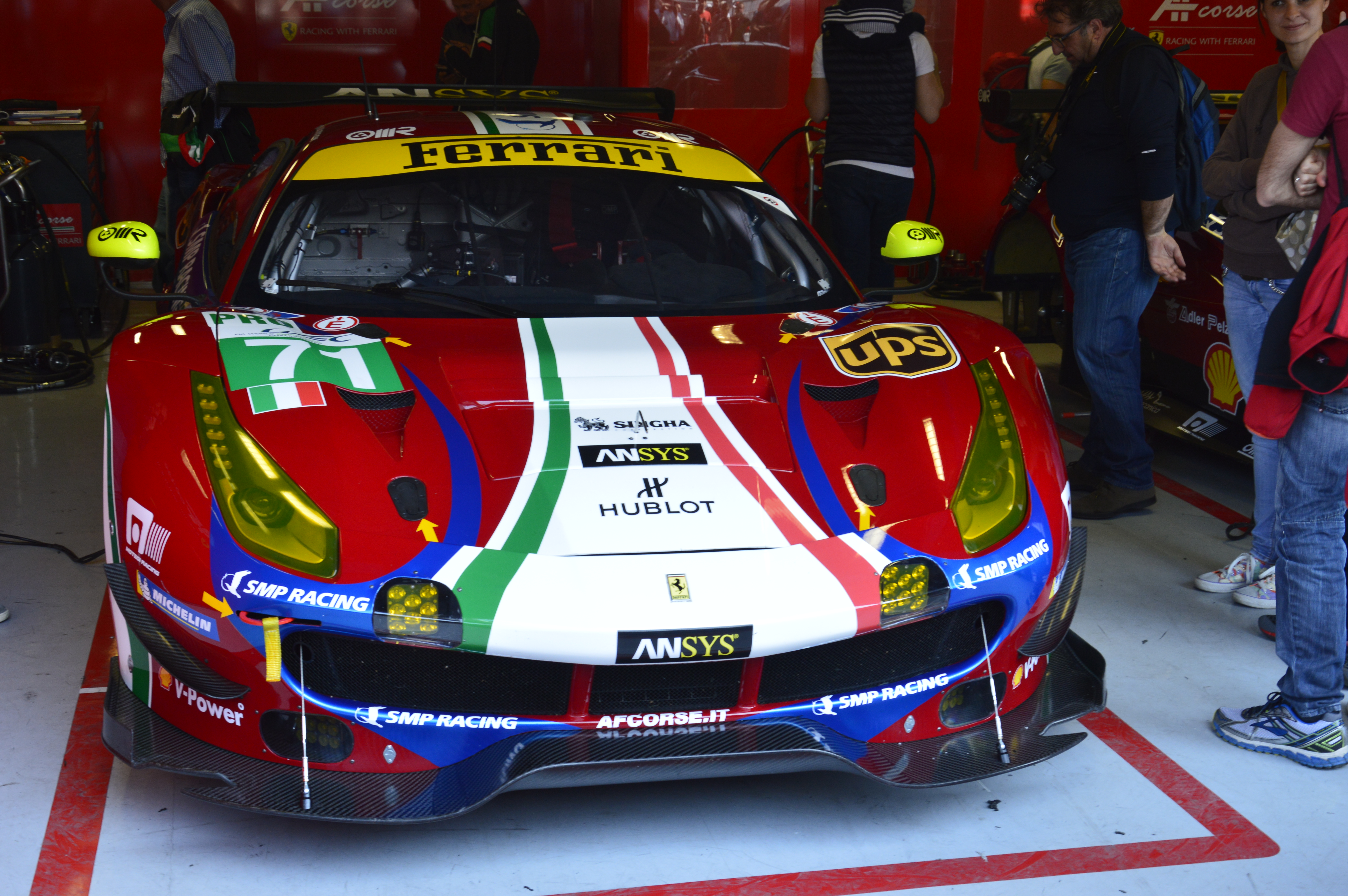 Ferrari 488 GTE del team AF Corse